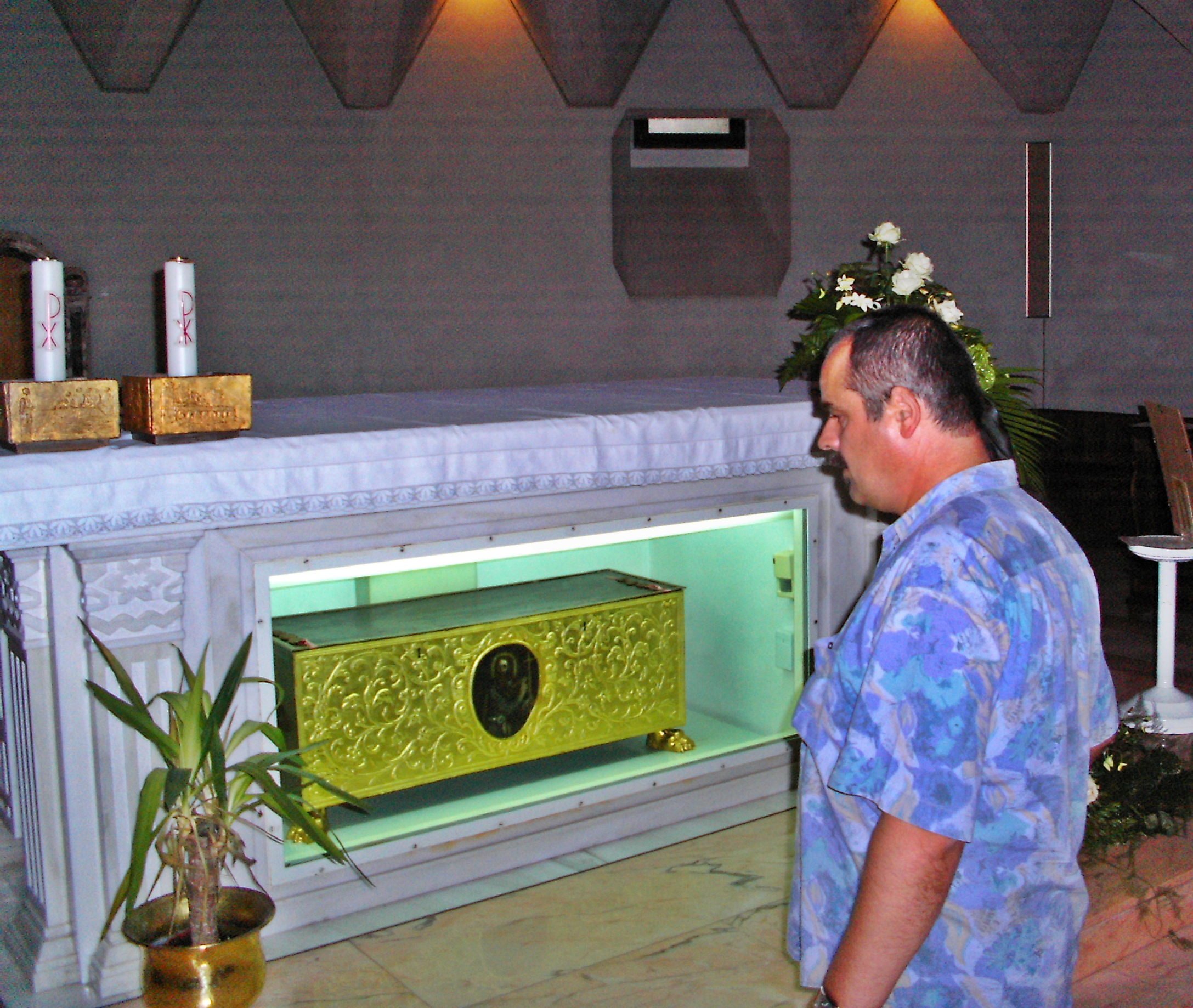 Reliquienaltar des Hl. Apostels Thomas, Unterkirche, Dom, Ortona